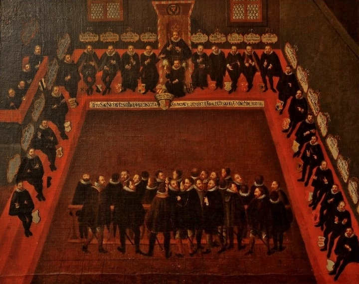 Český sněm, rožmberský vládce po pravici krále